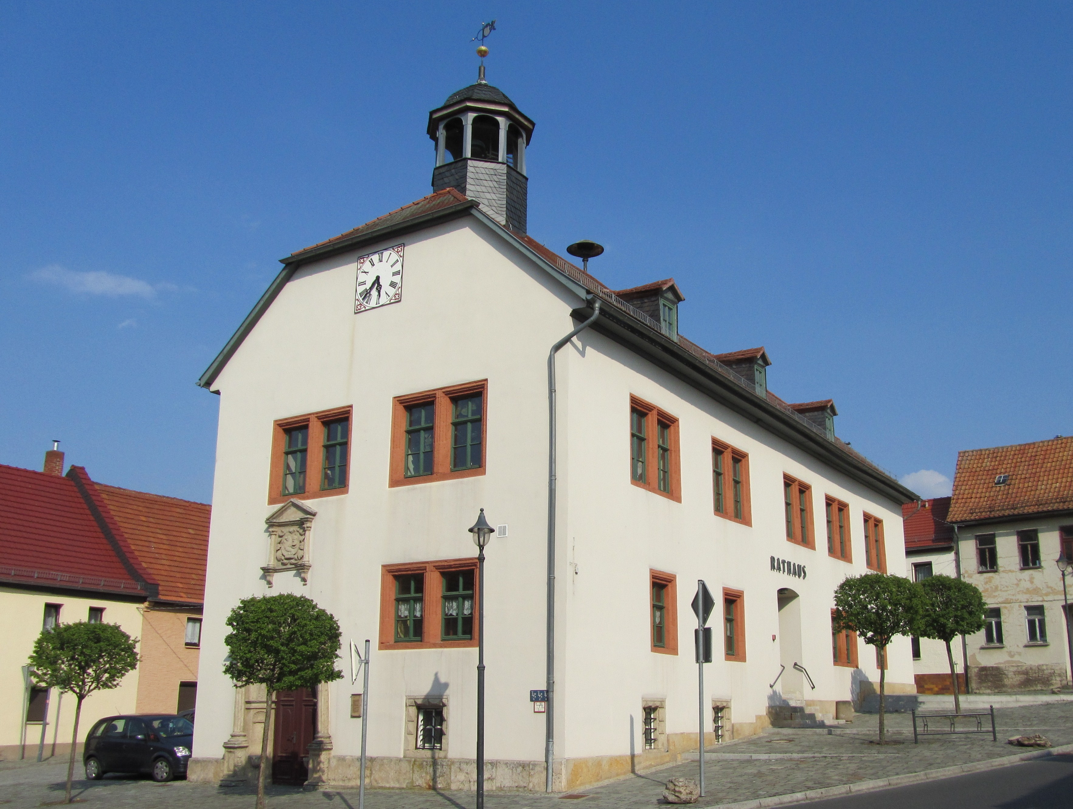 Das Rathaus von Magdala (Thüringen).